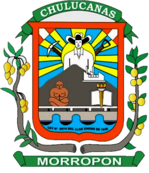 Escudo provincial de Morropón, Región Piura